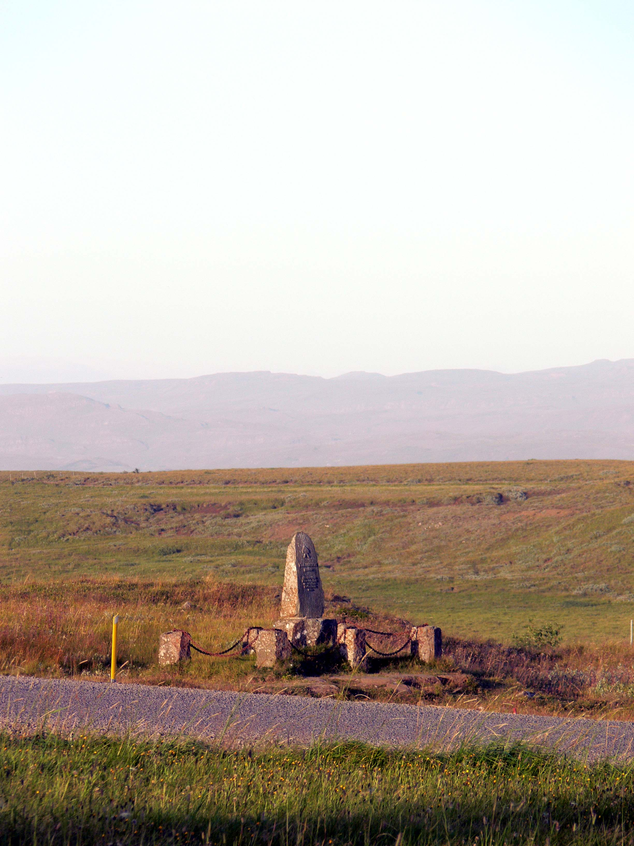 Hinrichtungsstätte des letzten katholischen Bischofs in Island Jón Arason bei der Kirche in Skálholt.